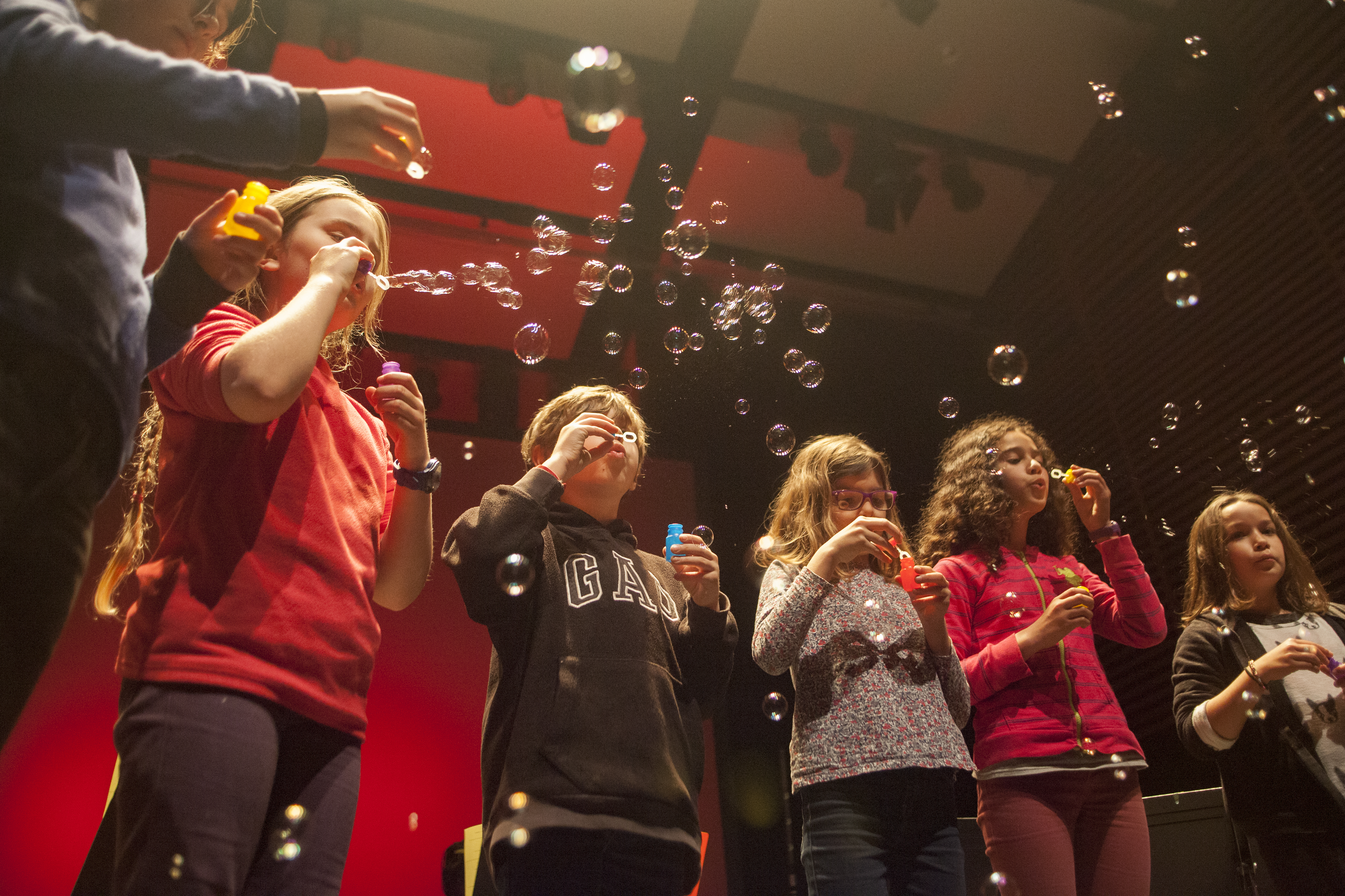 Pédagogie